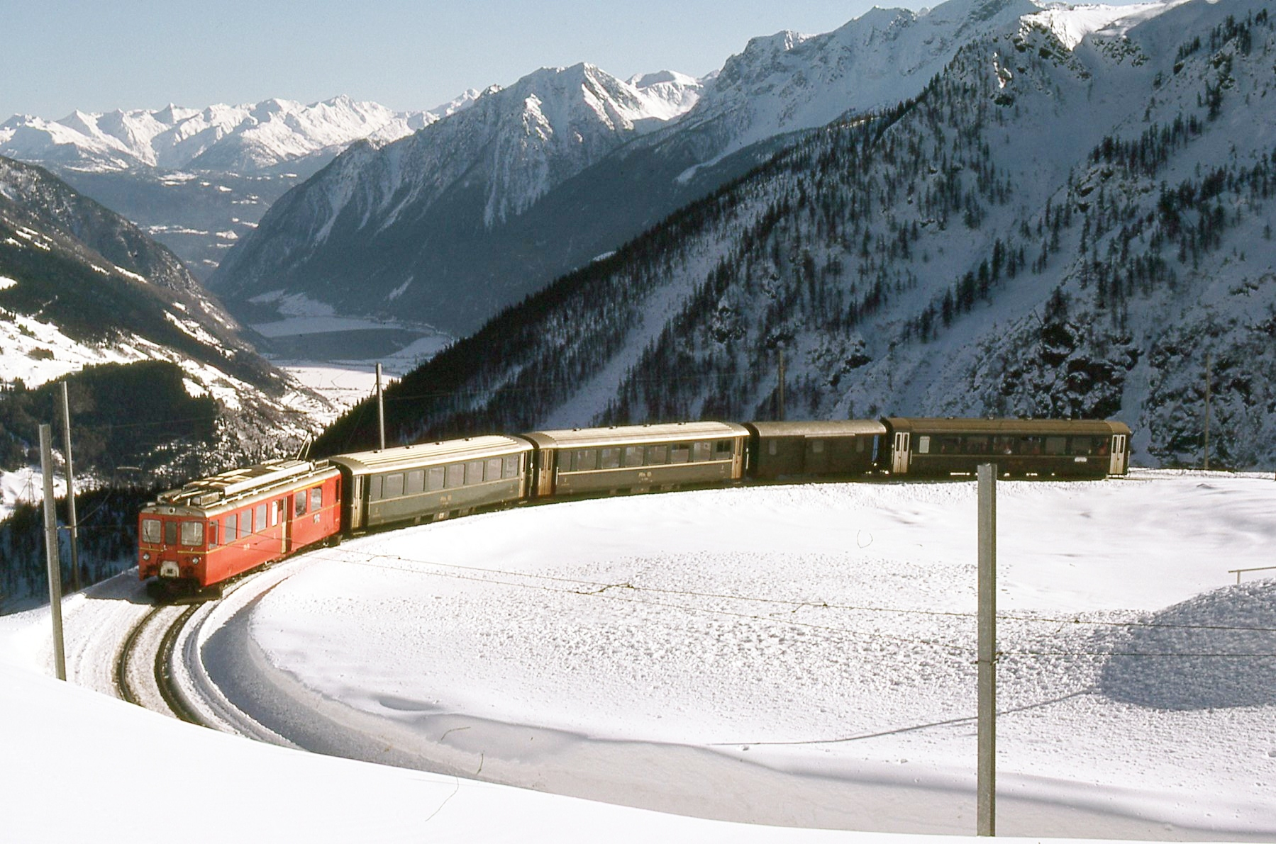 Photo prise entre 1980 et 1985